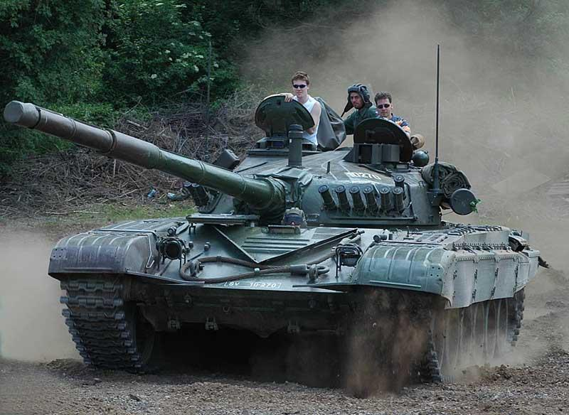 Slovenian Army M-84 MBT